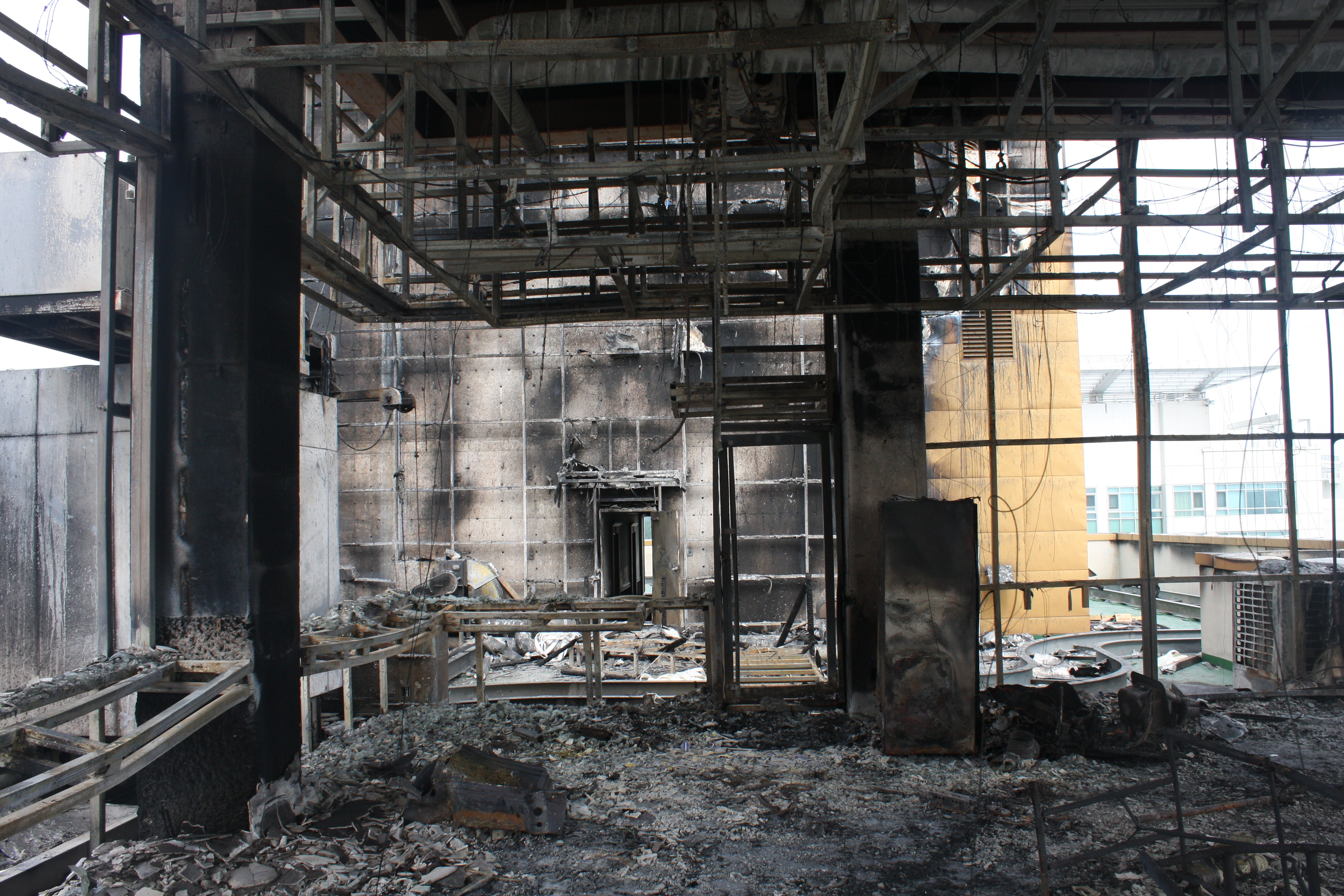 우신골든스위트 화재 사고